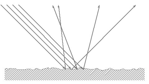 Schéma réflexion diffuse Auteur : Fabien2005 Catégorie:Schéma_de_physique